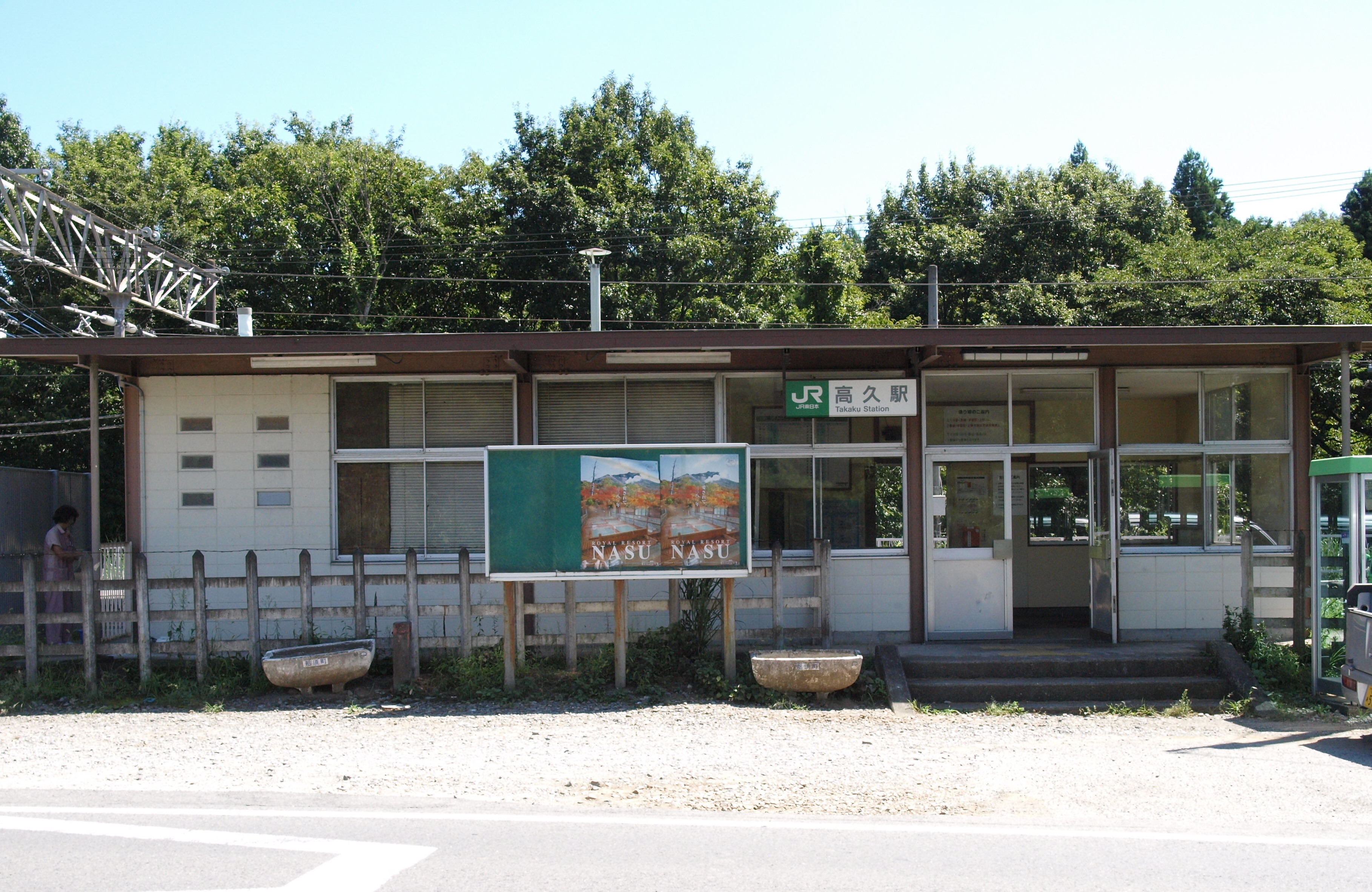 高久駅駅舎